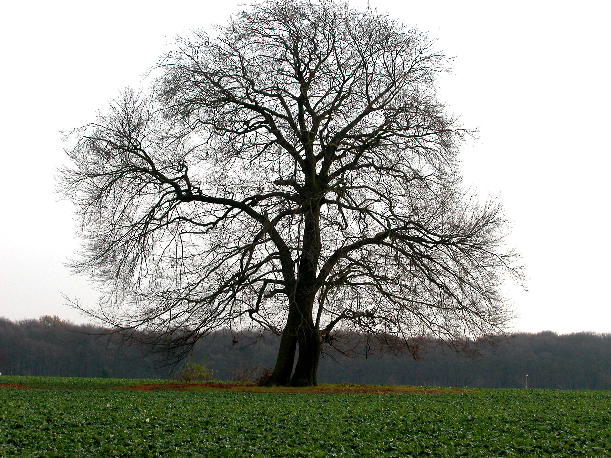 Die «zwei-beinige» Napoleonsbuche in Gahmen